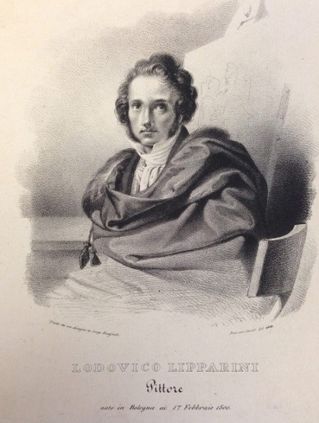 Ludovico Manfredi, litografia, 22 x 16 cm.